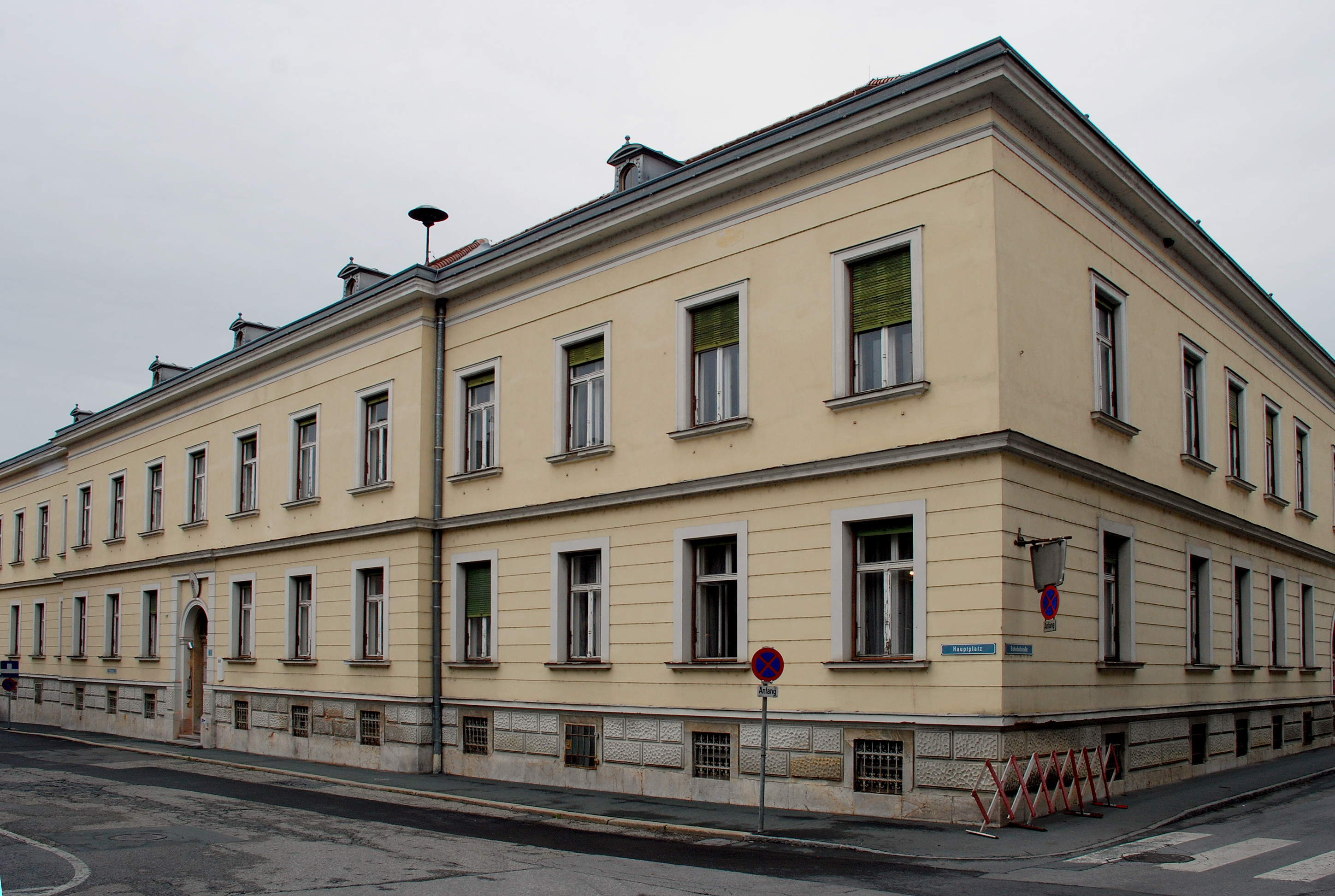 Stainz, Steiermark, Österreich: Bezirksgericht Hauptplatz 11 Object location46° 53′ 37.06″ N, 15° 15′ 58.62″ E